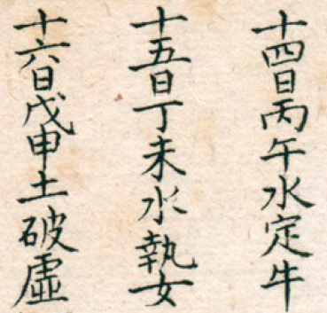 粵語: 大宋寶𧙗四年會天曆某幾日